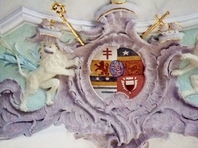 Kath. Pfarrkirche St. Gordian und Epimachus, Unterroth, Landkreis Neu-Ulm Wappen des Augsburger Fürstbischofs Joseph Landgraf von Hessen-Darmstadt